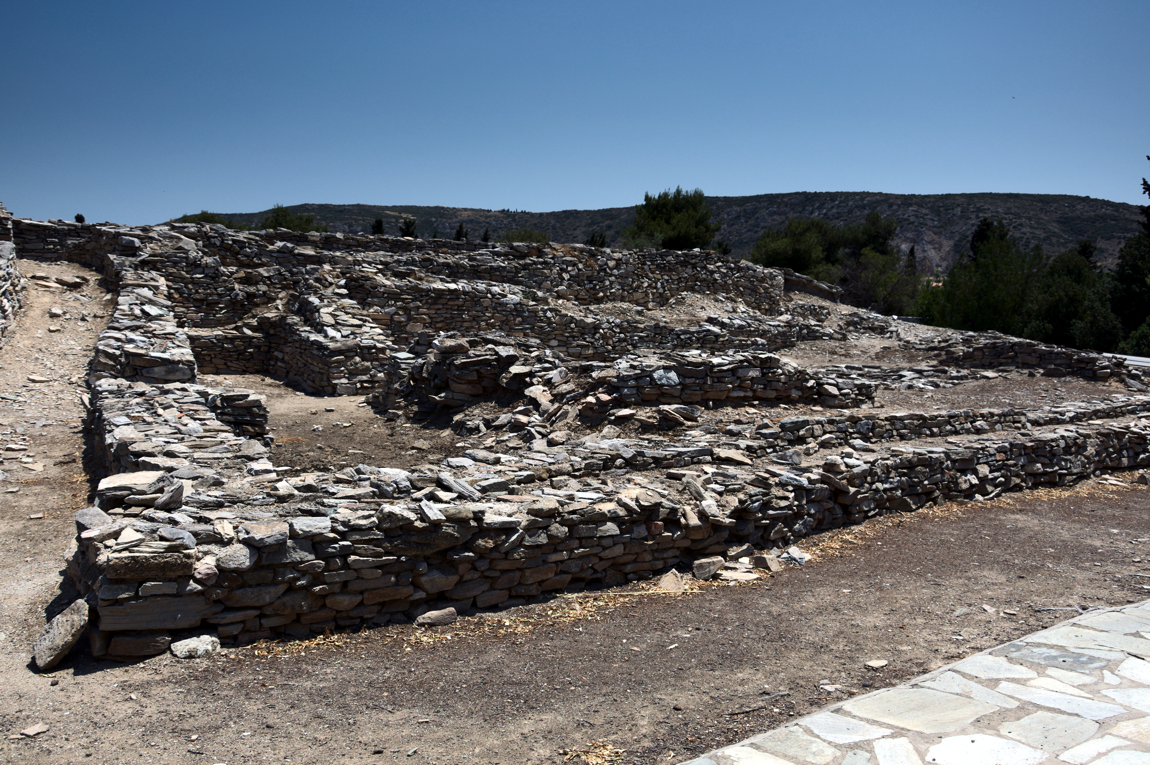 Διμήνι«Διμήνι»